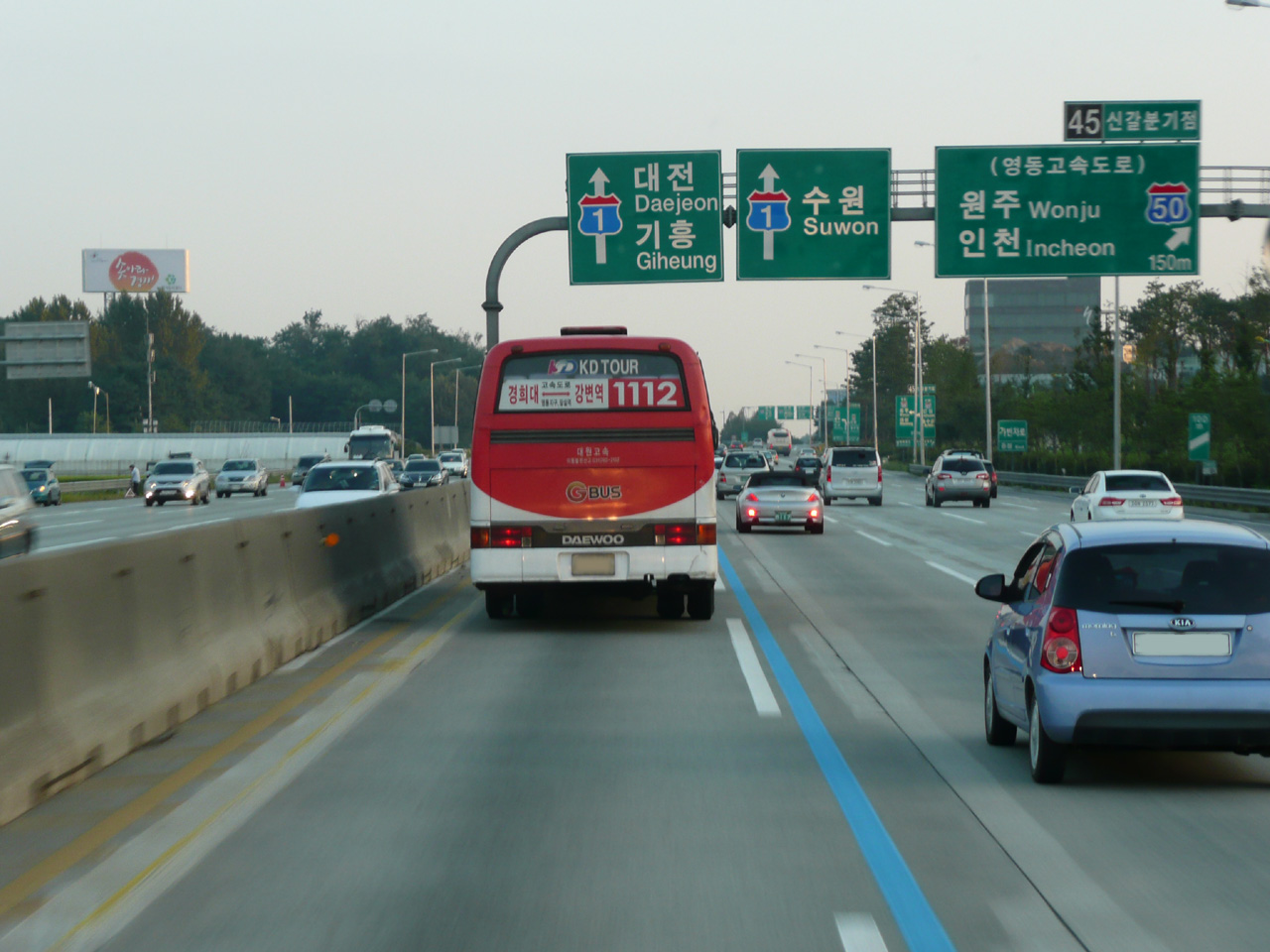 신갈분기점(경부고속도로 부산방면)